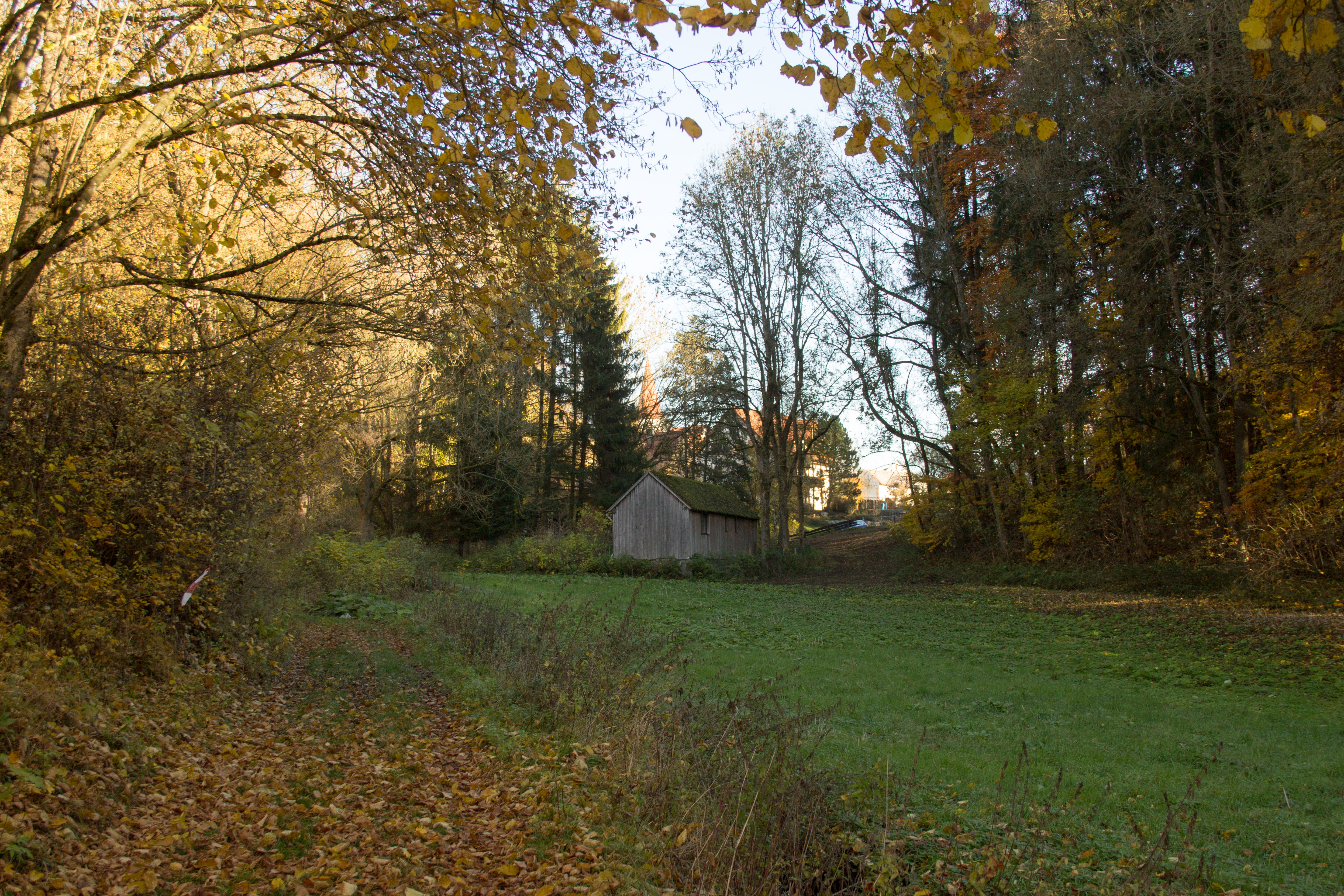 Traunfeld, Traunfelder Bachtal, Landschaftsschutzgebiet